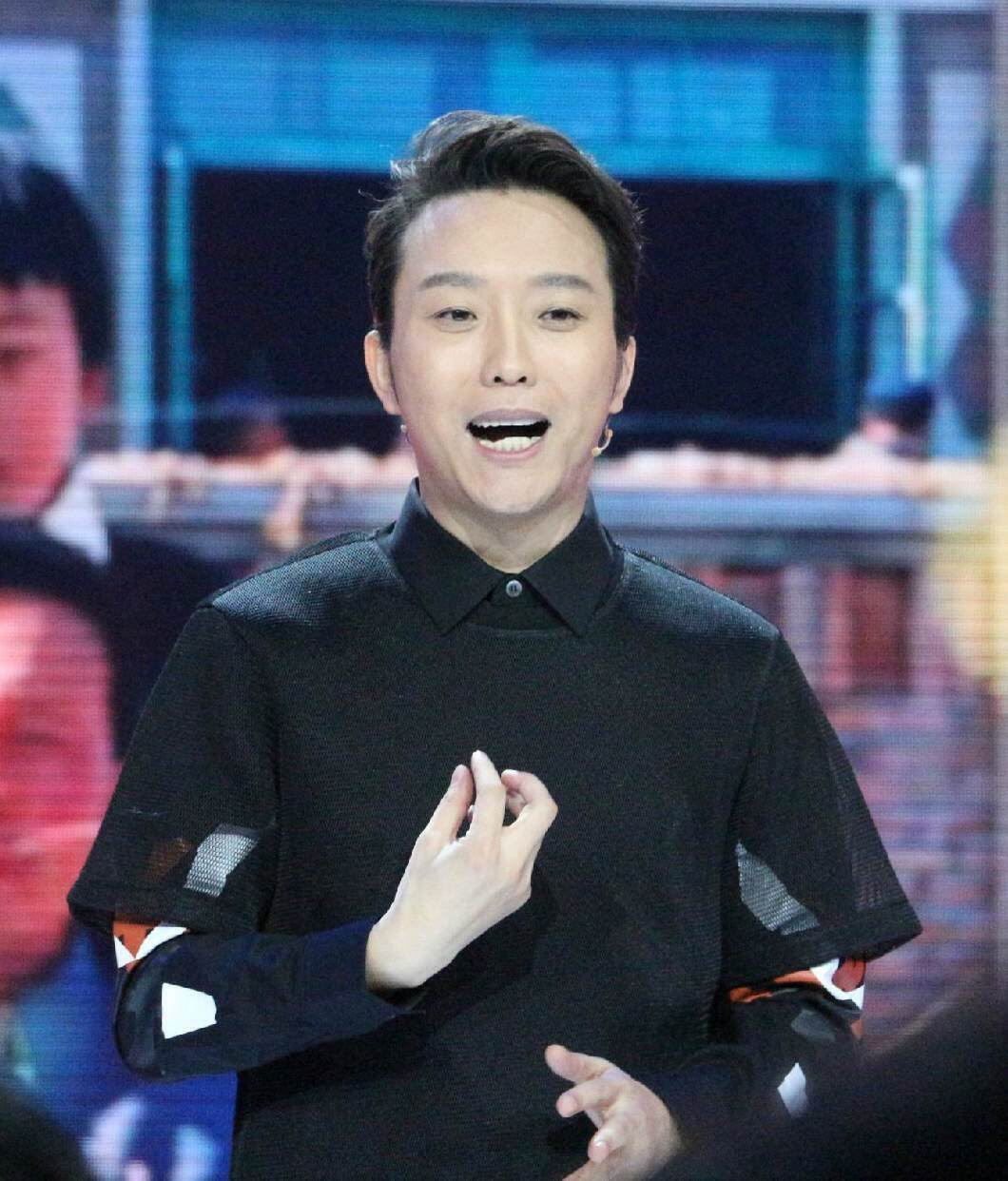 Lý Ngọc Cương (李玉剛, Li Yugang) tại talkshow "Nhân Sinh Tương Đối Luận" ngày 6 tháng 5 năm 2015